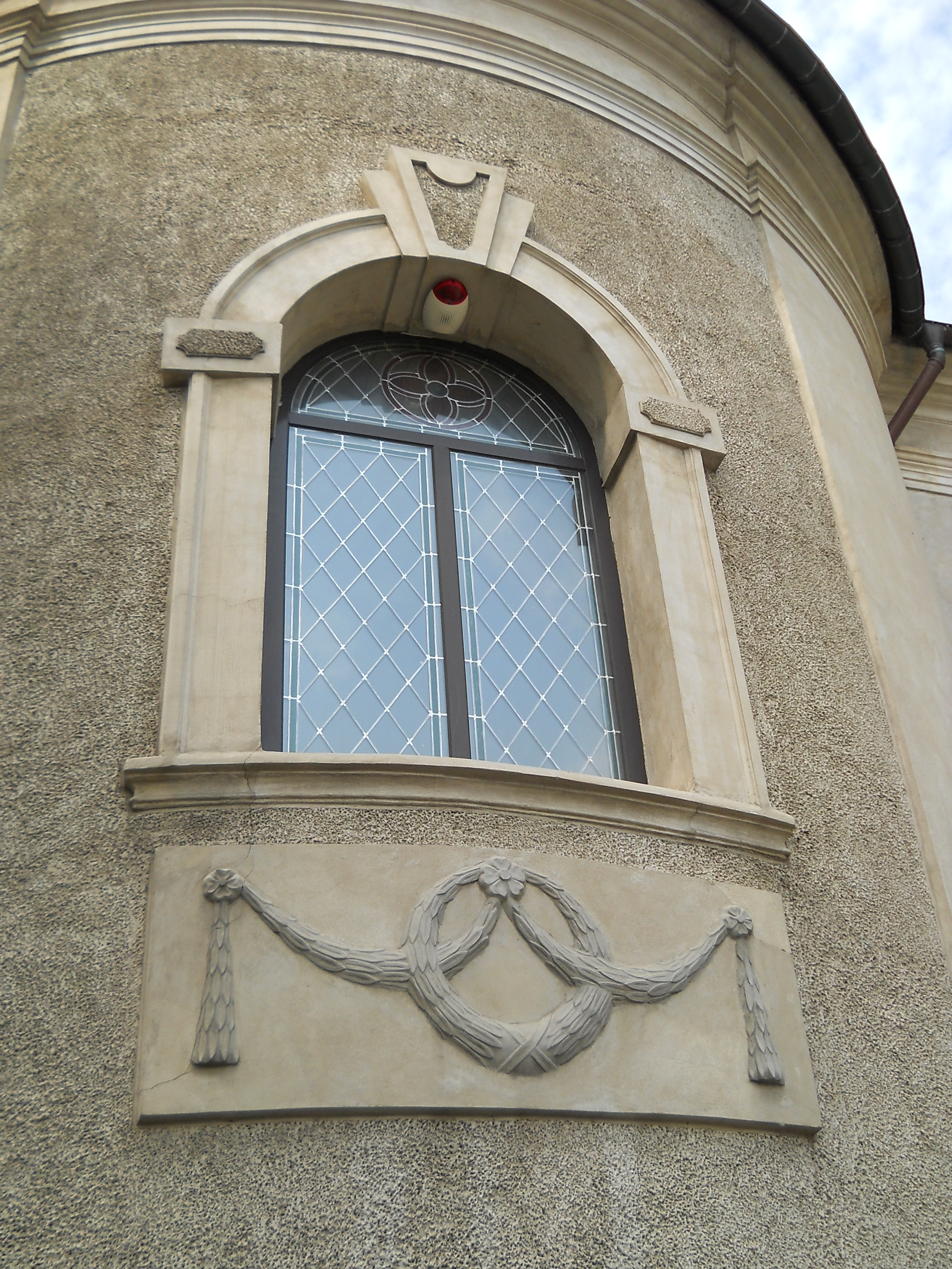 Toszek, ul, Parkowa - dawna kaplica cmentarna, obecnie kościół pw. św. Barbary (zabytek nr A/339/60 z 7.03.1960)